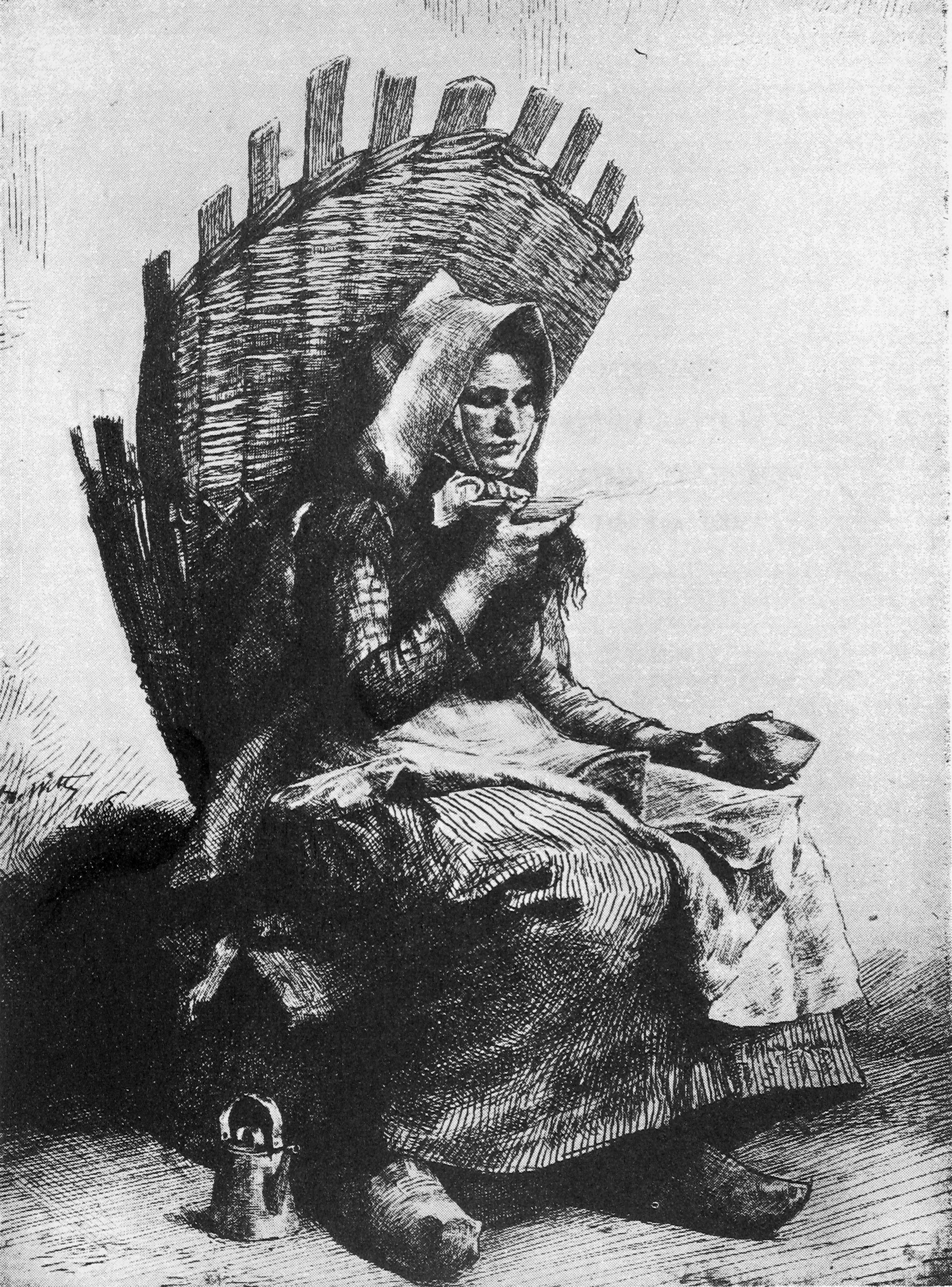 La botteresse, Dessin de 1886, Haust p. 3 Walon: Ene botresse